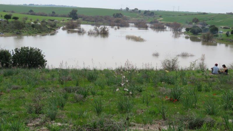 Pura Nature Reserve in the north Negev.